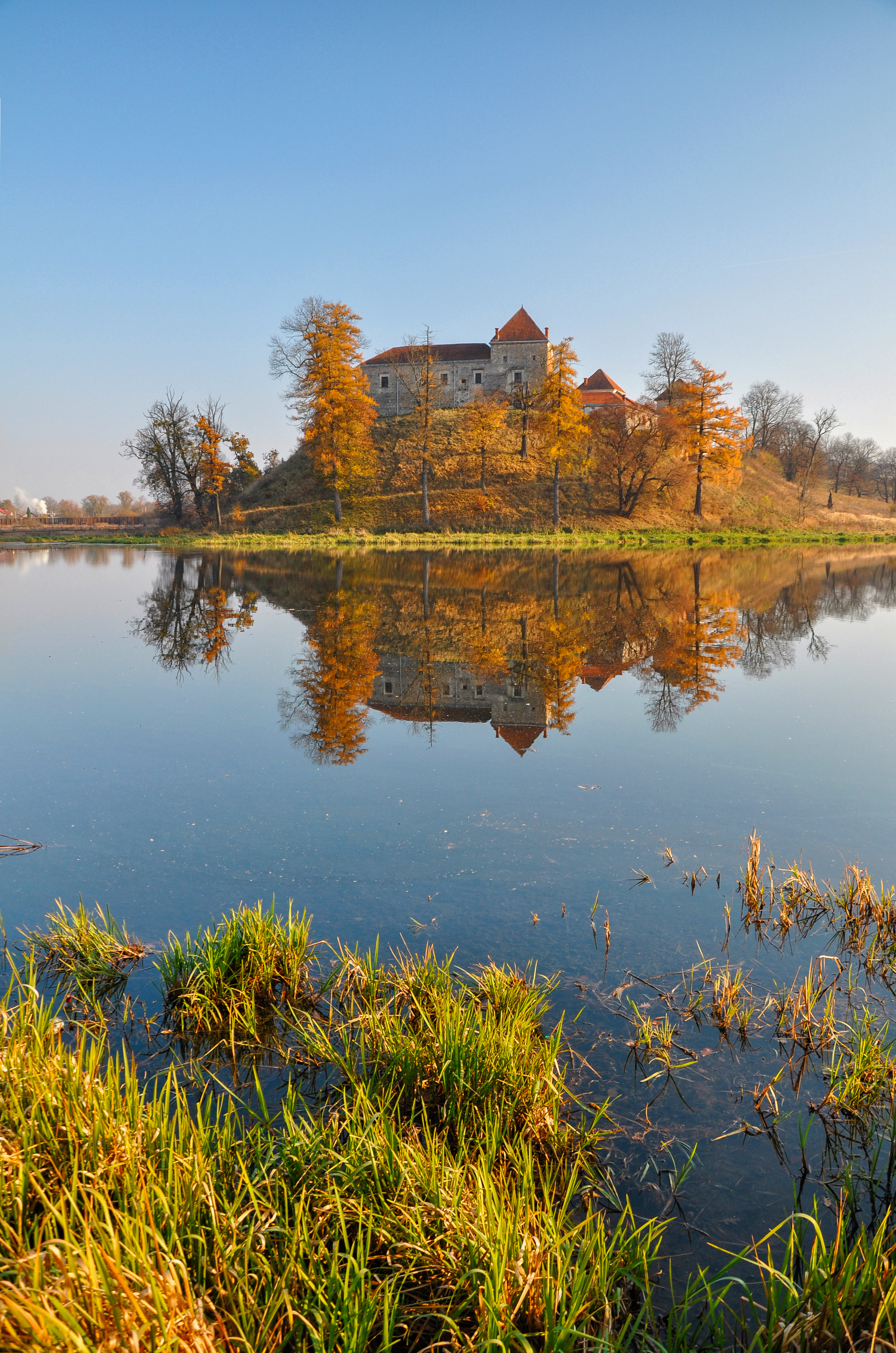 Замок (мур.), с.Свірж